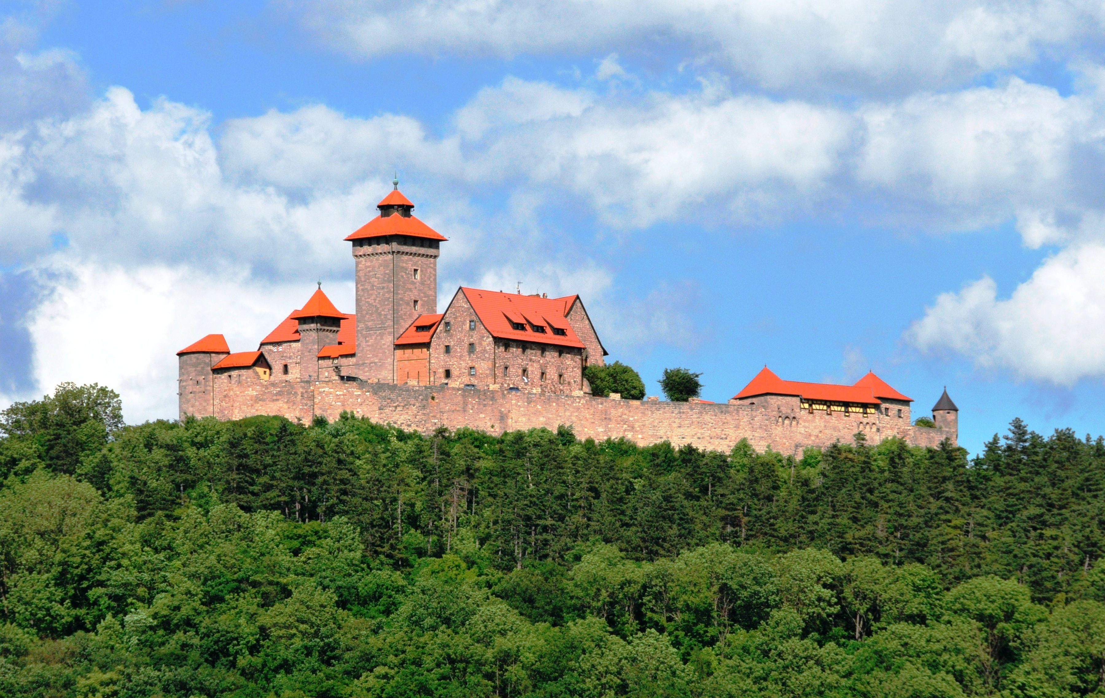 Wachsenburg aus Südwest